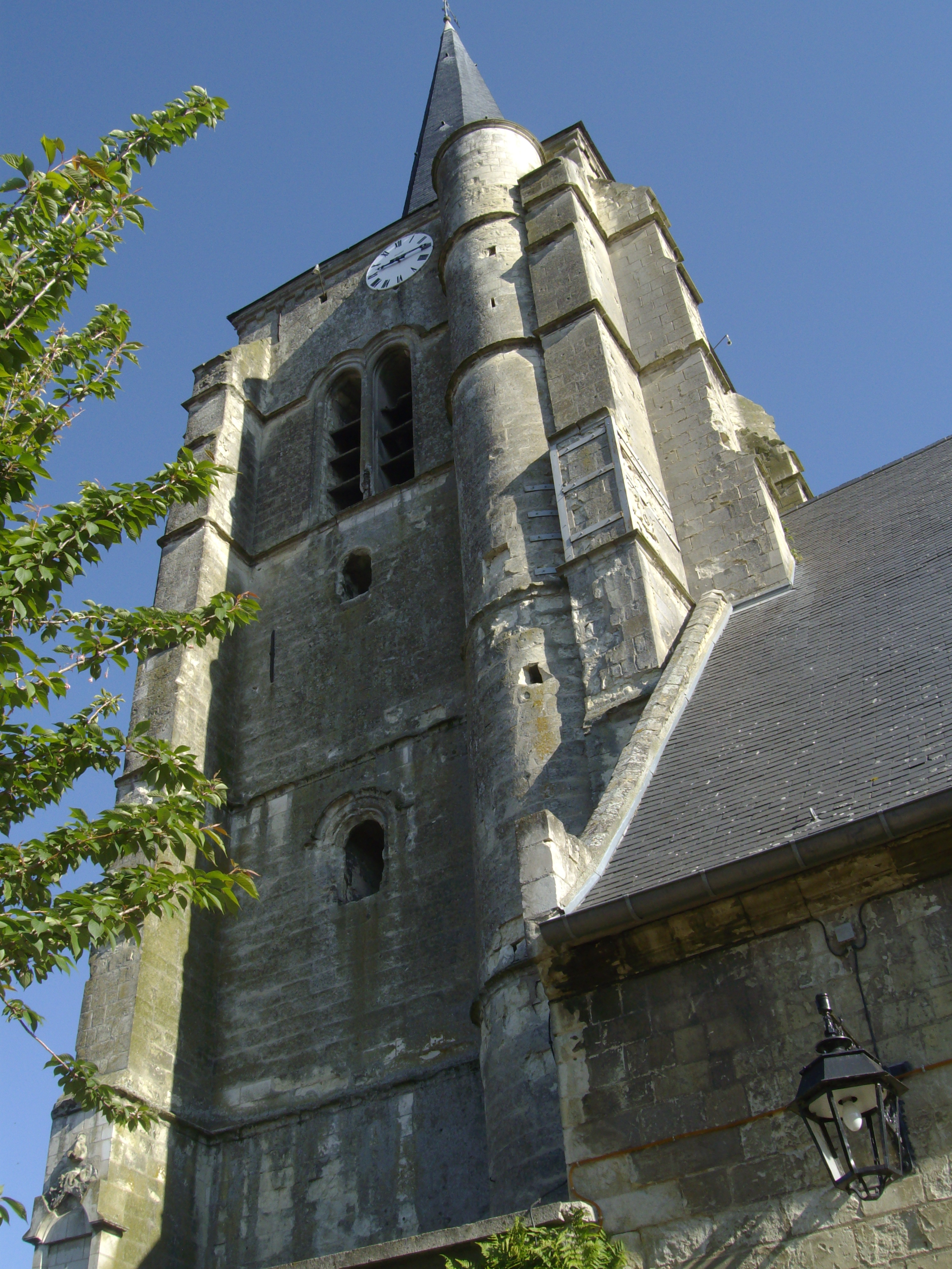 L'Eglise de Rieux-en-Cambrésis